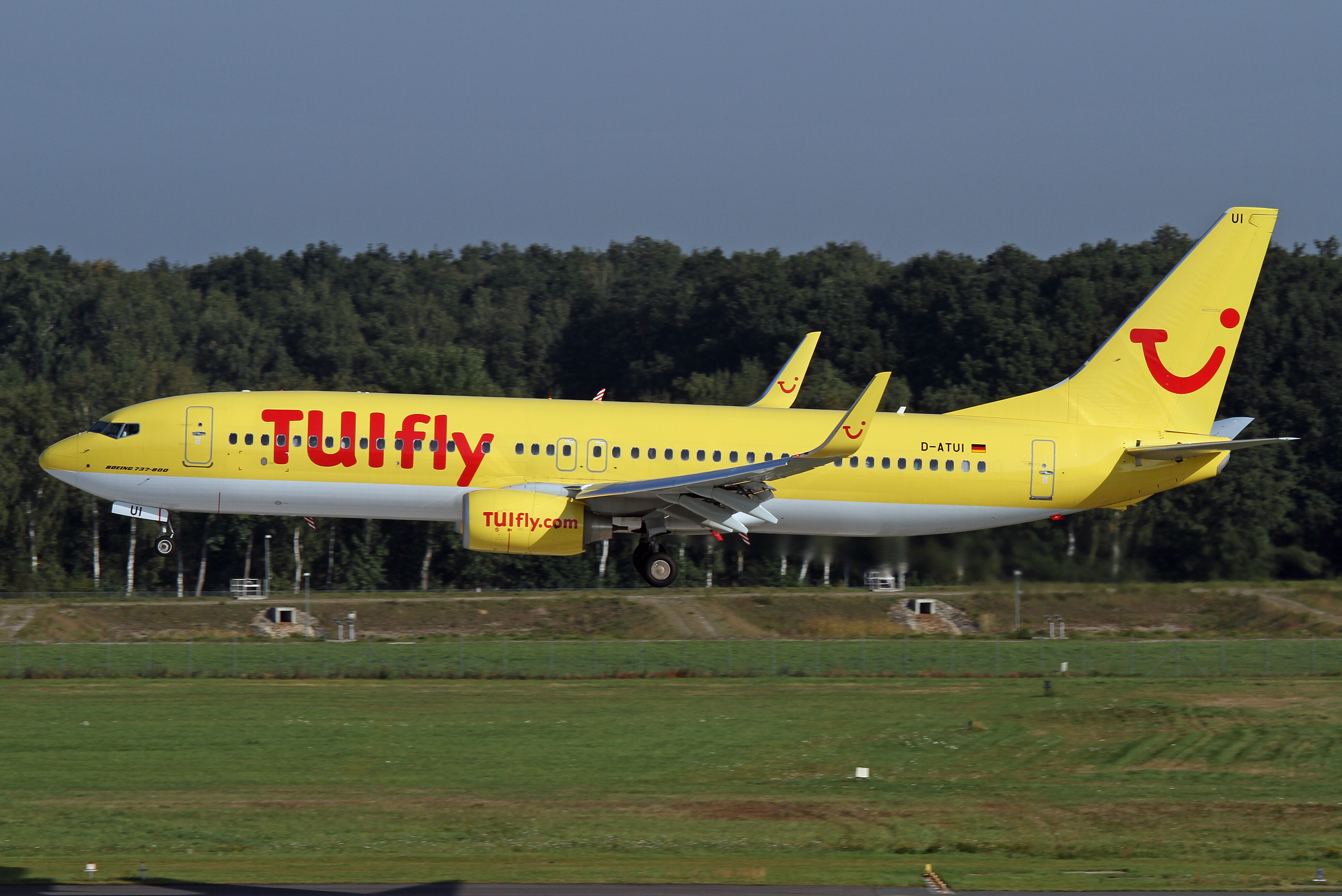 D-ATUI